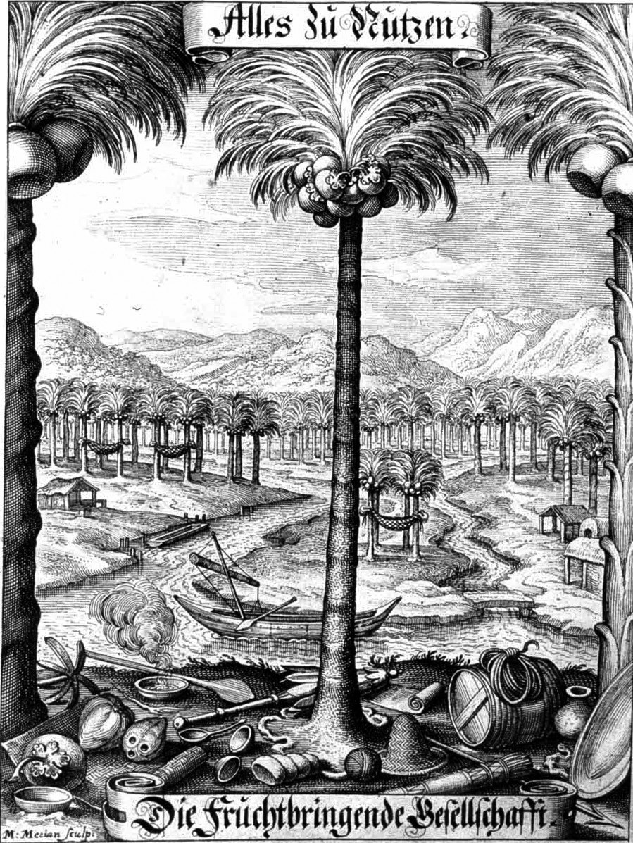 Kupferstich aus: Der Fruchtbringenden Gesellschaft Nahmen, Vorhaben, Gemählde und Wörter : nach jedes Einnahme ordentl. in Kupfer gestochen u. in achtzeilige Reimgesetze verf. bey Ludwig ; Mattheo Merian Frankfurt am Mayn 1646